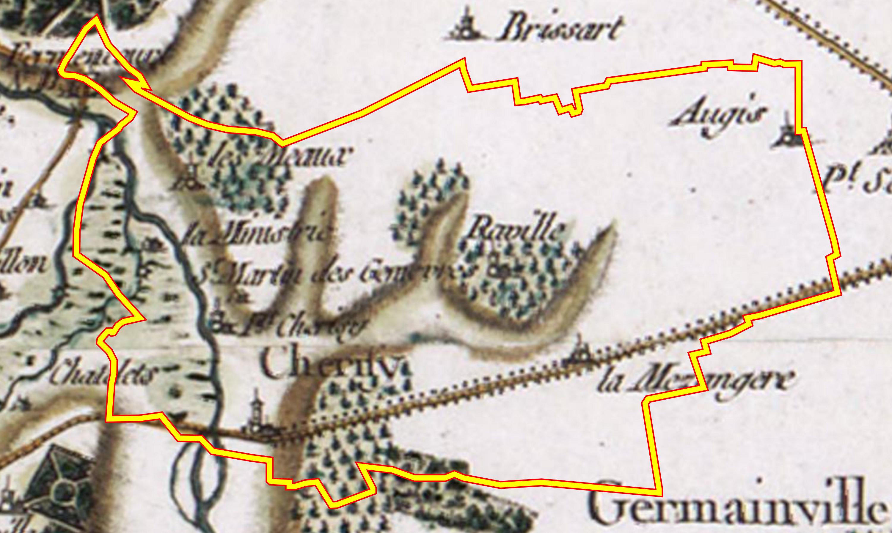 Cherisy (Eure-et-Loir) sur la carte de Cassini, avec les frontières actuelles.